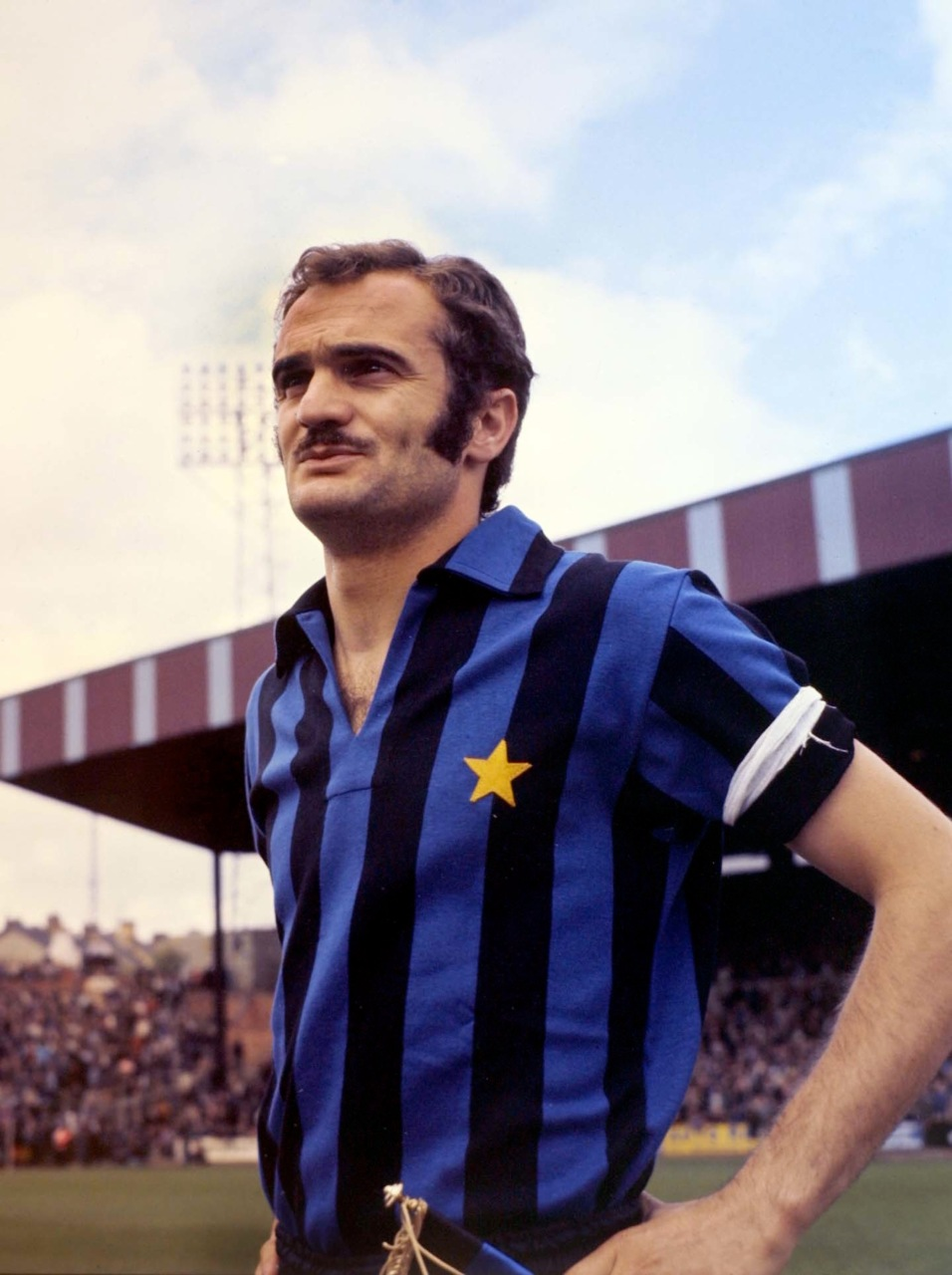 Mazzola con l'Inter. Licensing Mazzola, Sandro Categoria:Immagini di Sandro Mazzola